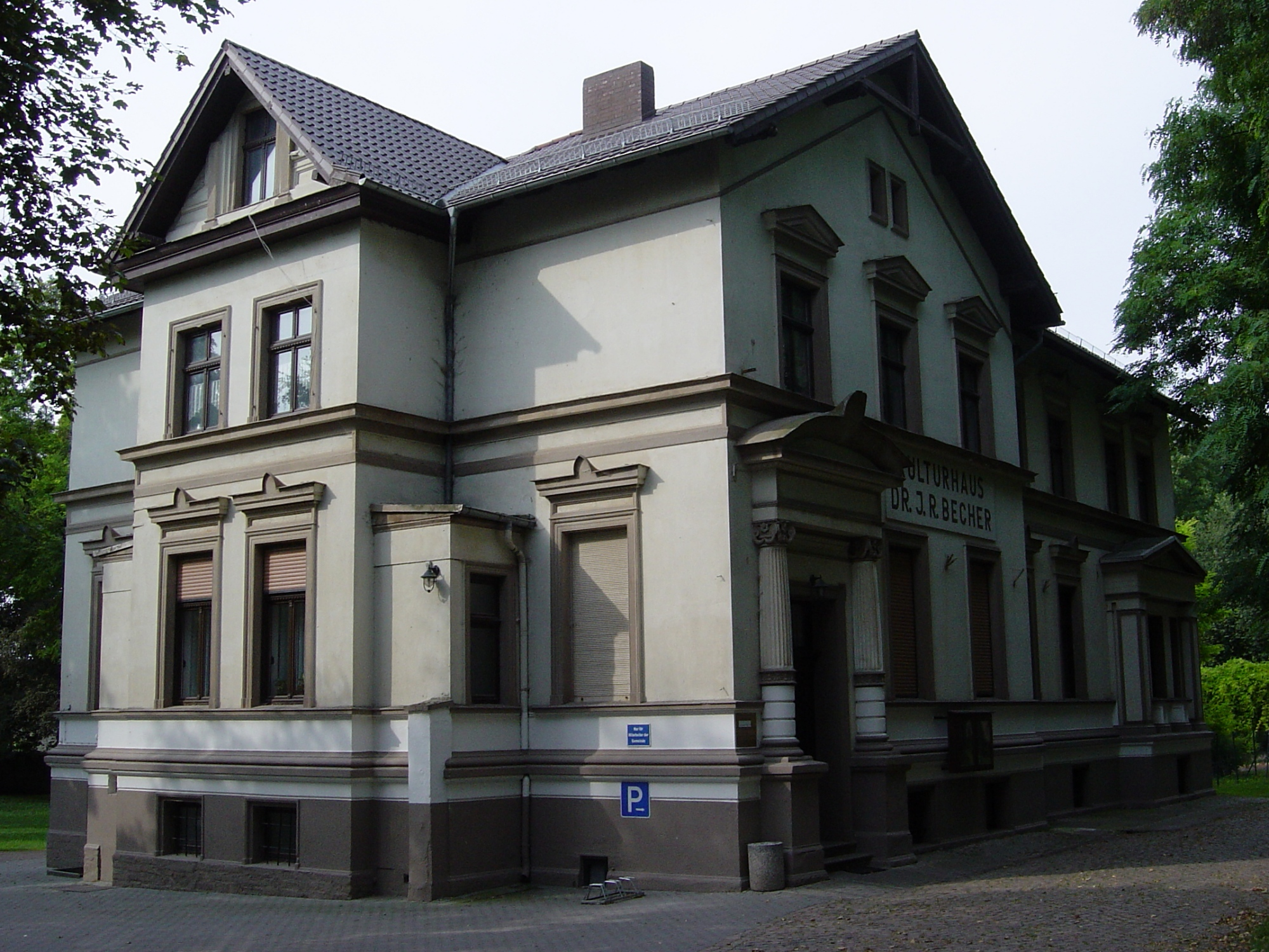 Kulturhaus Domersleben (ehemals Gartenstraße 4)